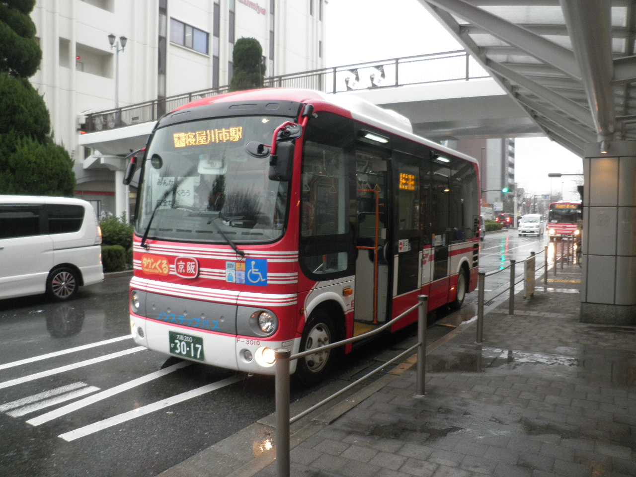 寝屋川市内を運行するタウンくる